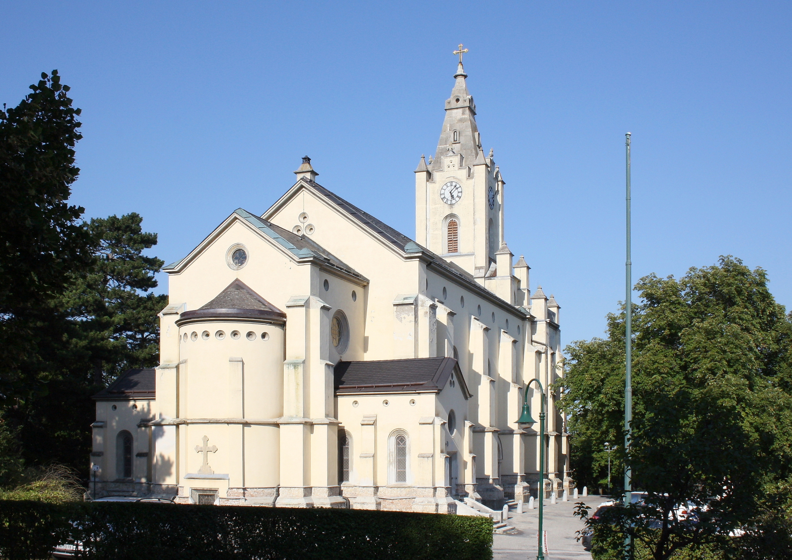 Westsüdwestansicht der röm.-kath. Stadtpfarrkirche hl. Jakobus der Ältere in der niederösterreichischen Stadtgemeinde Bad Vöslau.Die gewestete Saalkirche mit dominanter Osturmfassade im romantischen Rundbogenstil am Übergang zum strengen Historismus wurde von 1860 bis 1870 nach Plänen des Architekten Franz Sitte errichtet. Die vom Grafen Moritz II. von Fries (1804–1887) gestiftete Kirche ist das Hauptwerk des Architekten und der bedeutendste Sakralbau der Zeit im südlichen Niederösterreich.